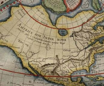 Noord-Amerika van een wereldkaart van Rumold Merkator, met de legendarisch land Ania bovenaan links.